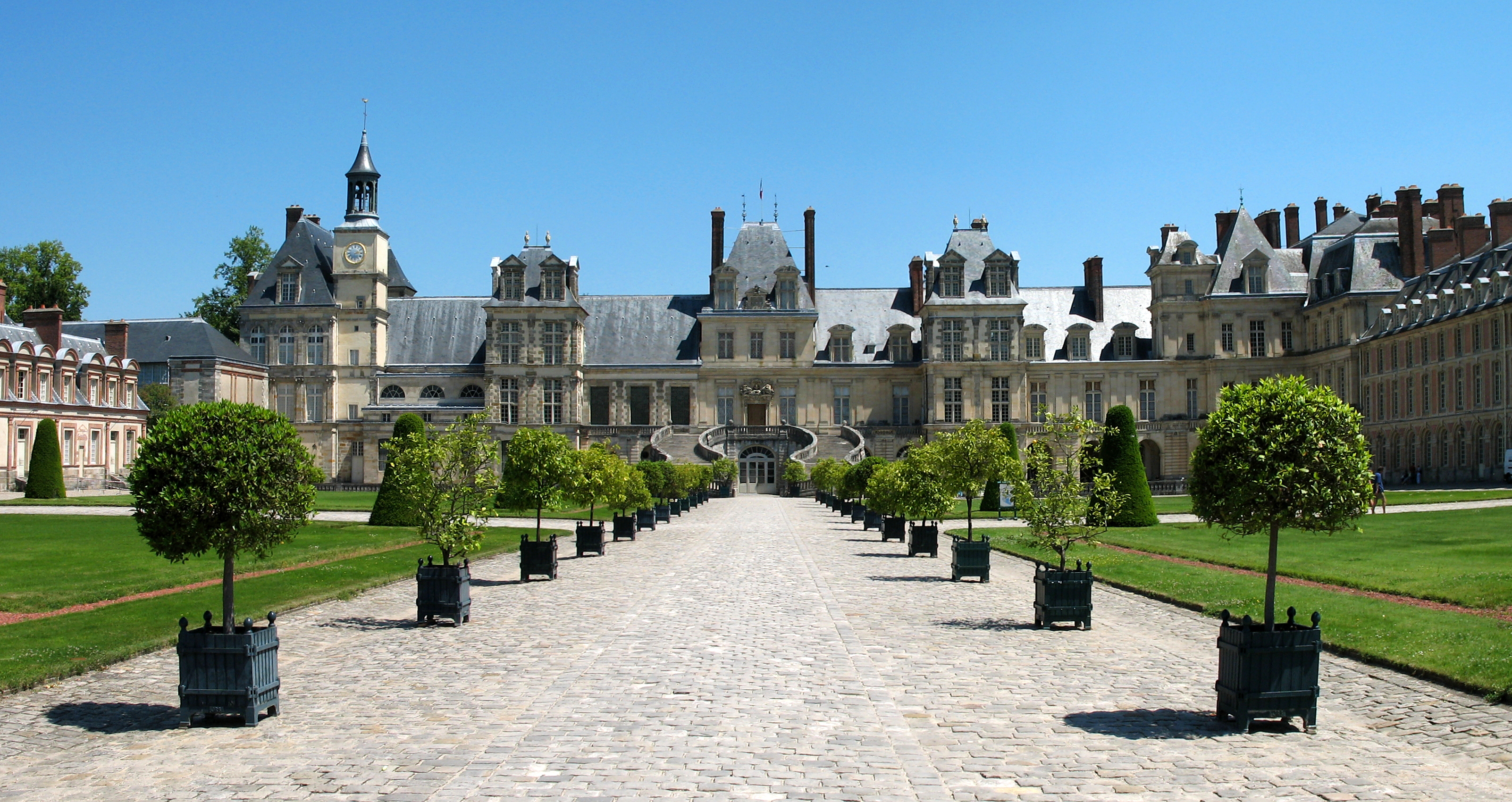 Schloß Fontainebleau (Panoramaausschnitt) fotografiert von Christoph Praxmarer im Juni 2006.